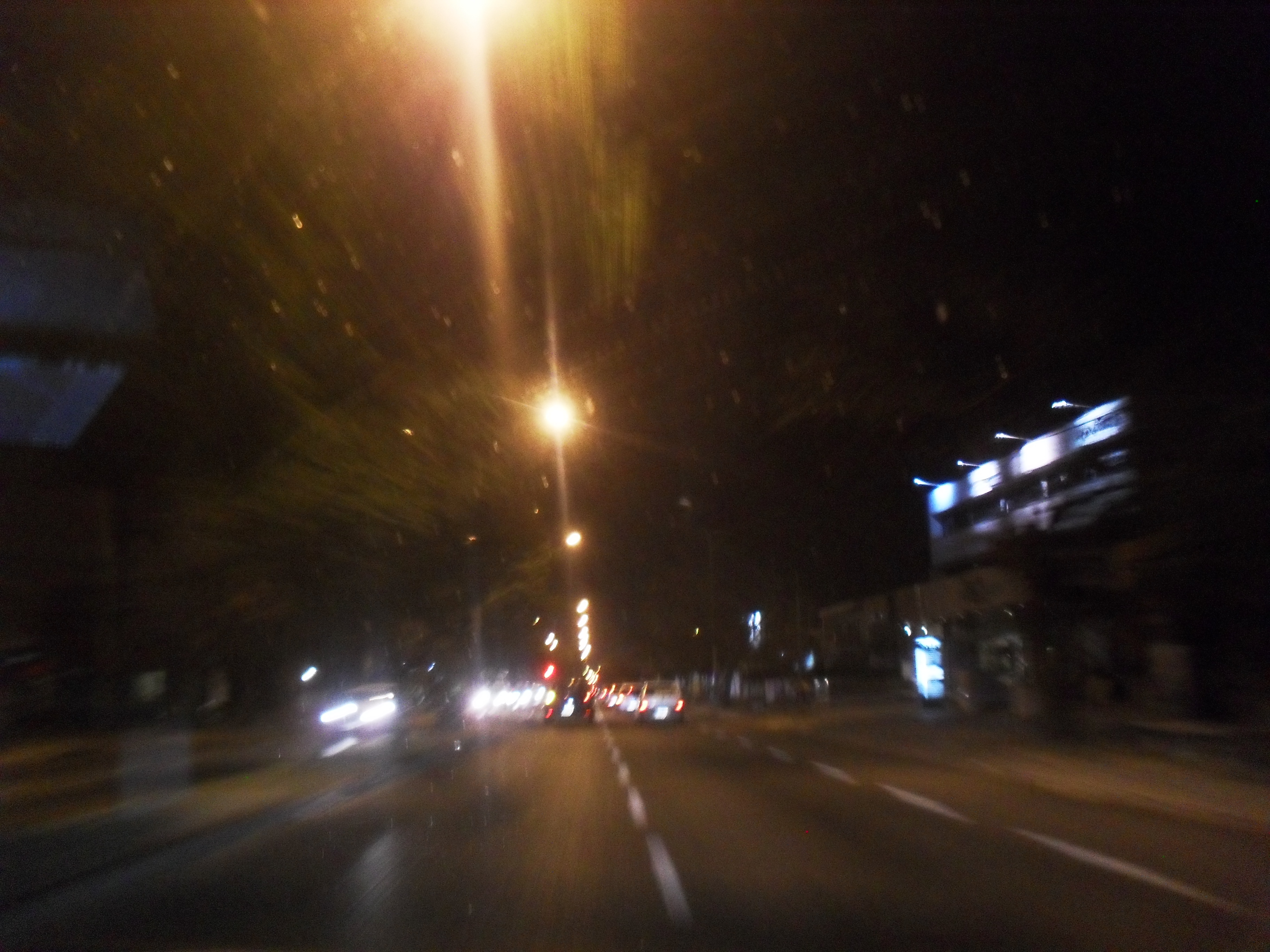 Vista nocturna de la avenida Rafael Núñez (Córdoba)